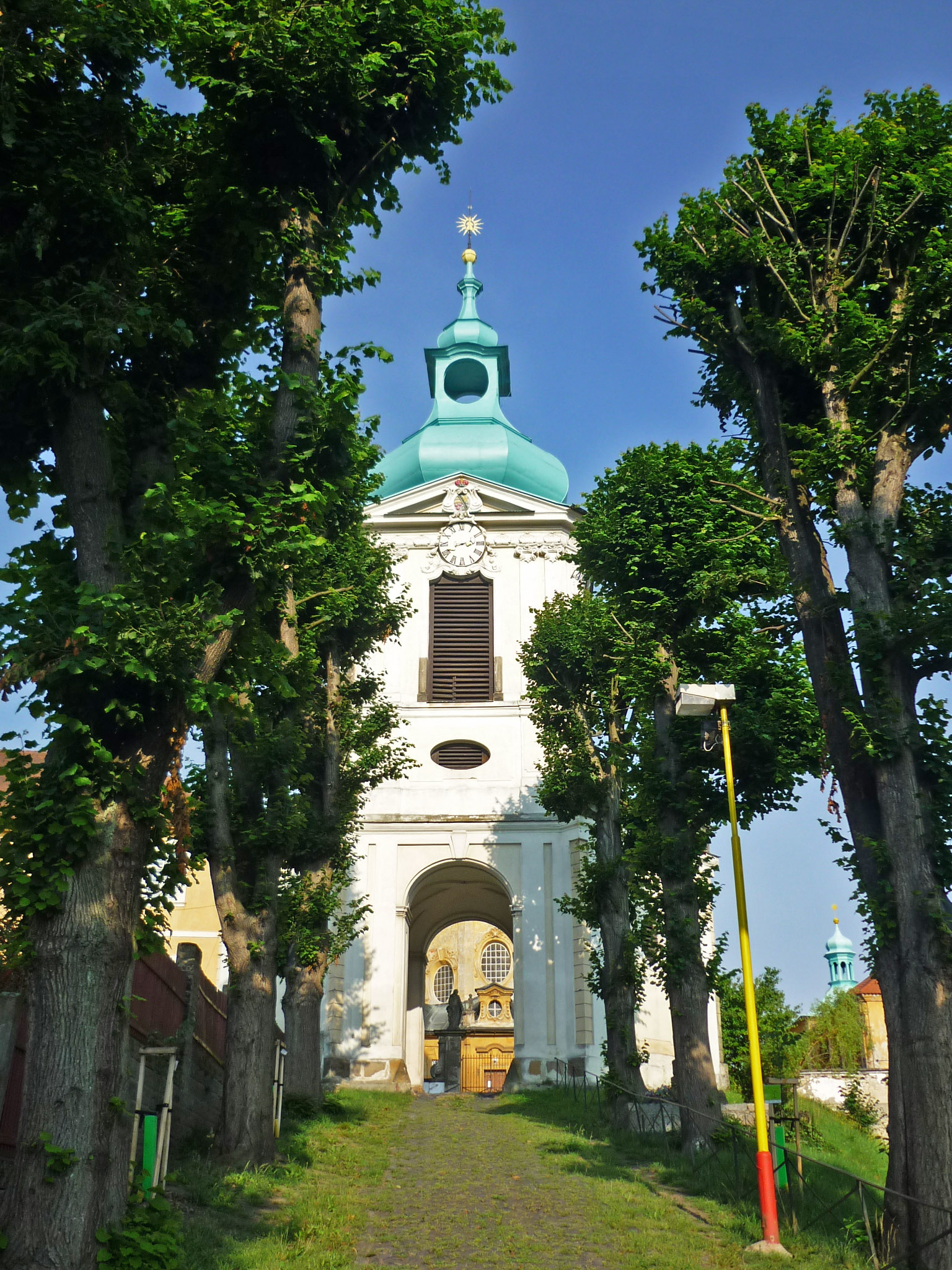 Glockenturm Oberpolitz (Horní Police) bei Böhmisch Leipa (Česká Lípa)